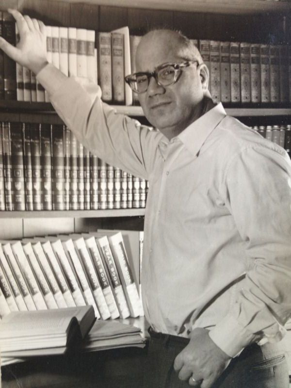 Sesto Prete